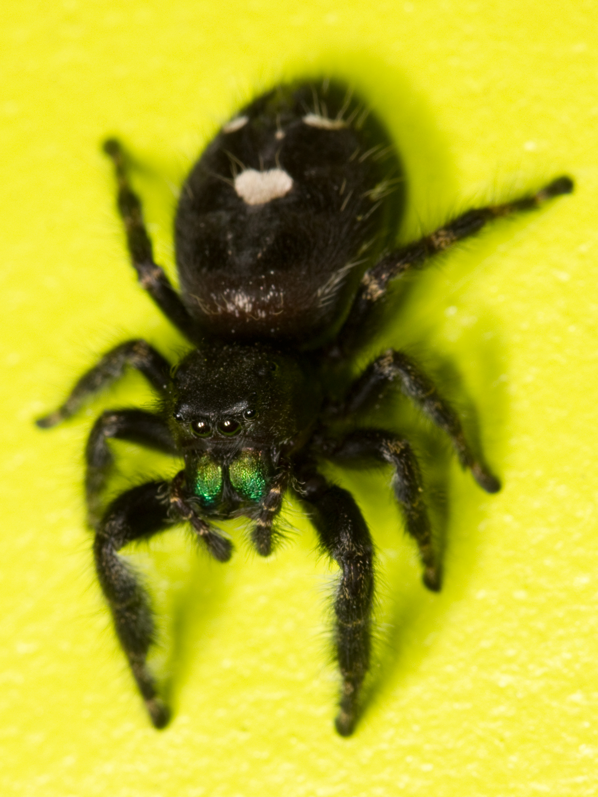 Adult female Phidippus audax jumping spider in Nashville, Tennessee